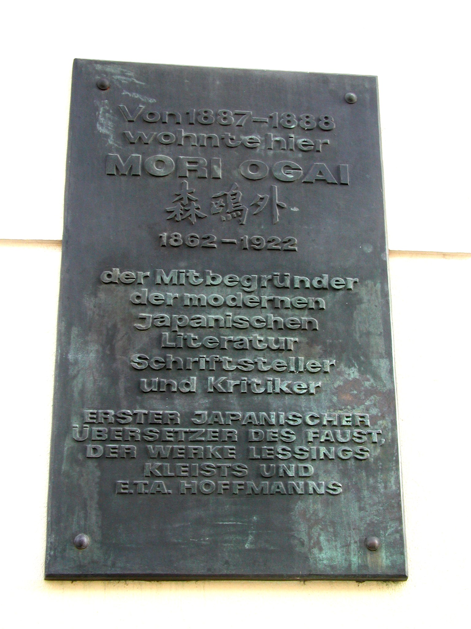 Gedenktafel für Mori Ogai in Berlin